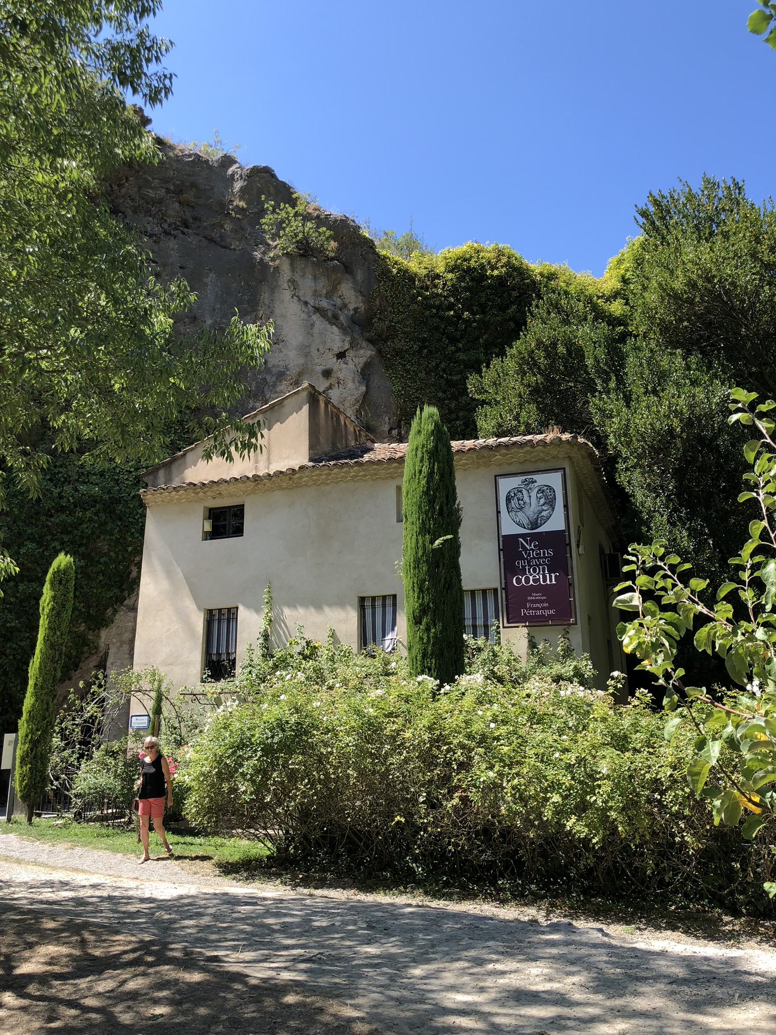 Das Haus des Mittelalterdichters Francesko Petrarca, heute ein Museum in Fontaine-de-Vaucluse, Provence-Alpes-Côte, Frankreich